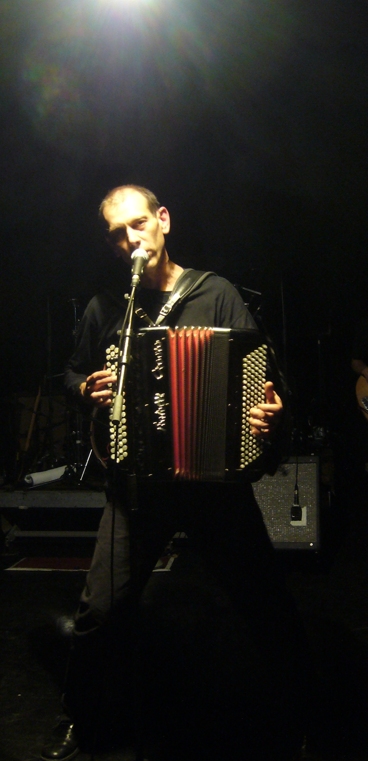 Christian Olivier, chanteur des Têtes Raides, lors de la chanson Ginette où une simple lampe à incandescence éclaire la scène en se balançant, lors du concert des Têtes Raides à Villeparisis le 7 octobre 2006.